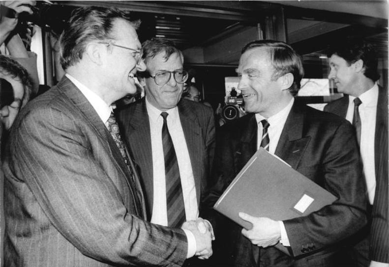 ADN-Settnik-19.4.1990 Berlin: Haussmann-Besuch Der Minister für Wirtschaft der DDR, Dr. Gerhard Pohl (l), und Bundeswirtschaftsminister Dr. Helmut Haussmann (r) sind in Berlin zu ersten offiziellen Gesprächen zusammengetroffen. Mitte: Dr. Franz Bertele, Leiter der Ständigen Vertretung der BRD in der DDR.